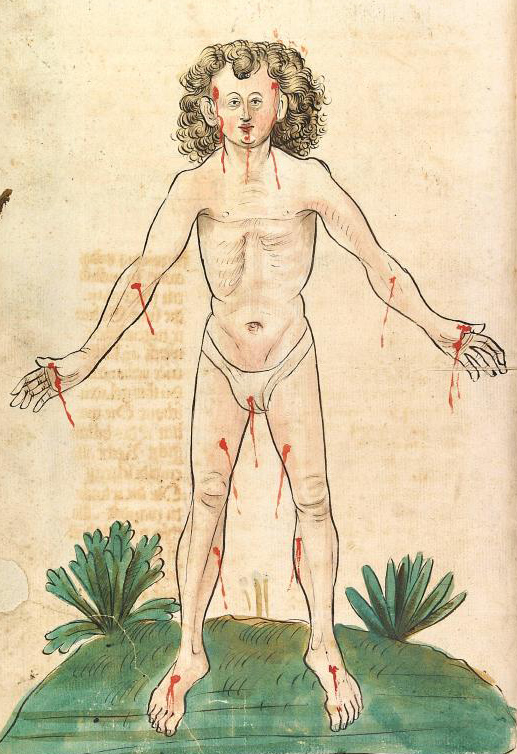 Aderlaßmännlein aus Konrad von Megenberg, Buch der Natur, Hagenau - Werkstatt Diebold Lauber um 1442-1448